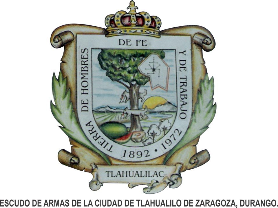 Escudo de armas de Tlahualilo de Zaragoza. Obra del Prof. y Lic. Arturo Sandoval Ceniceros.